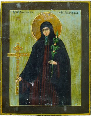 Прп. Евфросиния Полоцкая. Икона. Ок. 1910 г. (ГМИР)